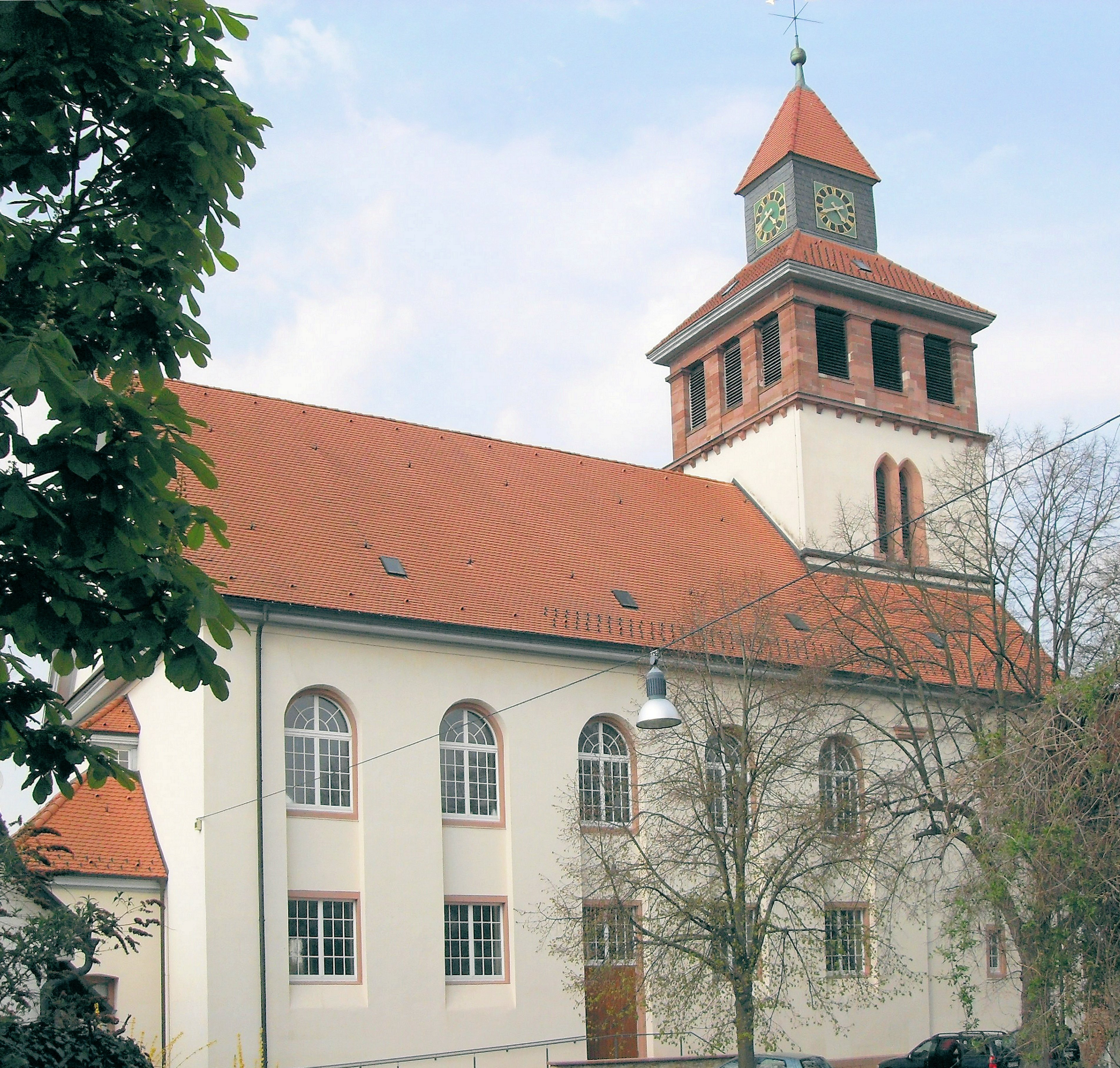 evangelische Laurentiuskirche in Binzen, Deutschland